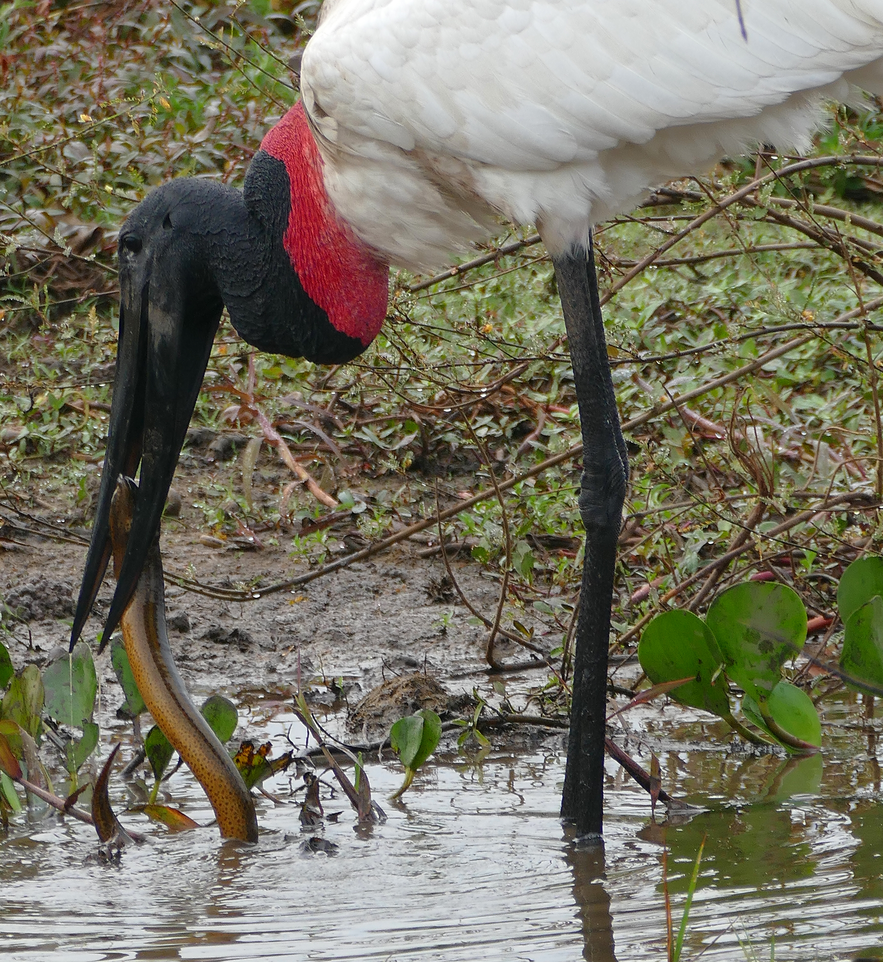 Transpantaneira, Poconé, Mato Grosso, BRAZIL